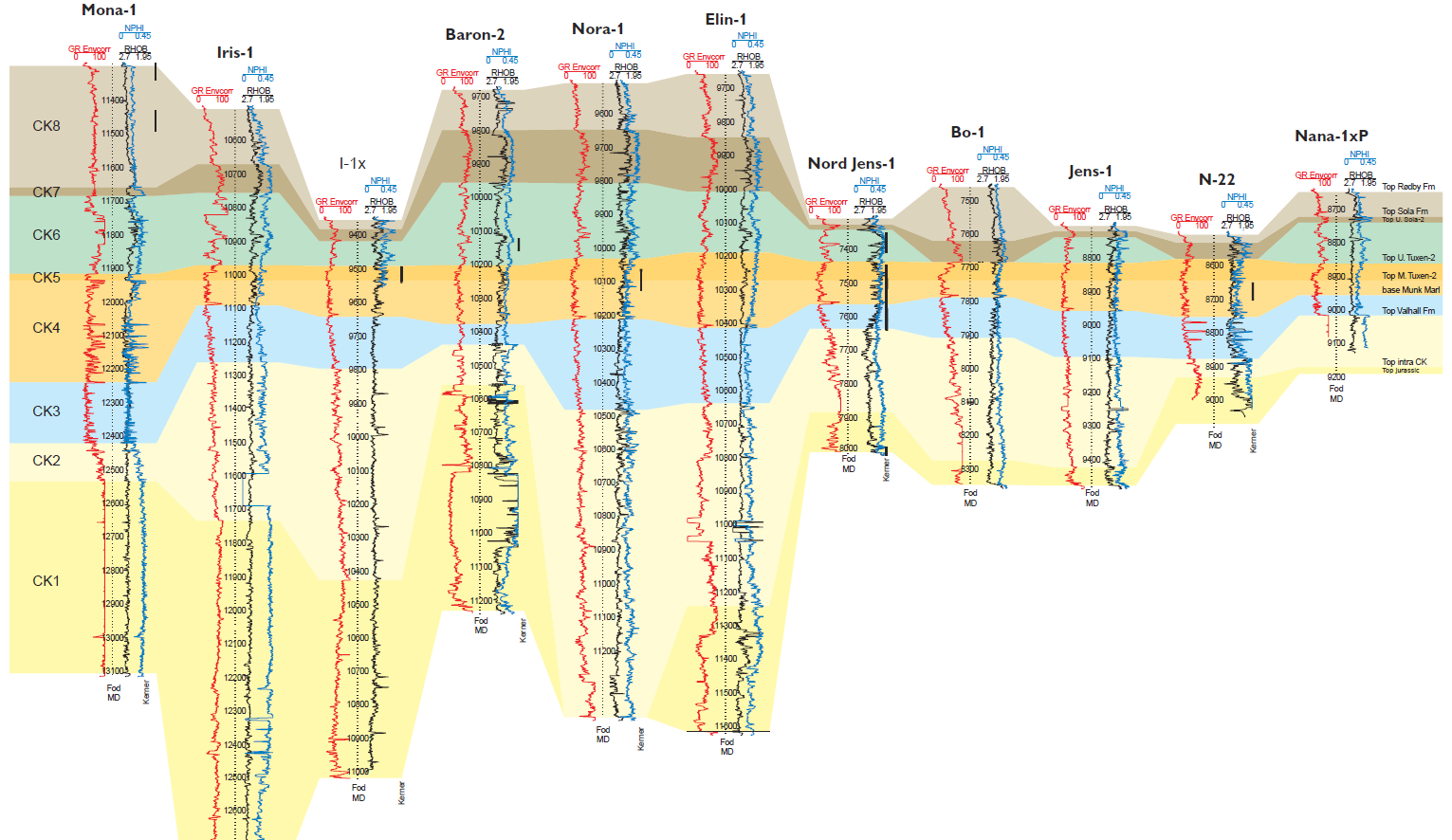 Panel med geofysiske logs i seks boringer i Central Graven. Forklaring til kurverne: rød - gammastråling, blå - porøsitet, sort - densitet; de geologiske enheder er beskrevet ude til højre